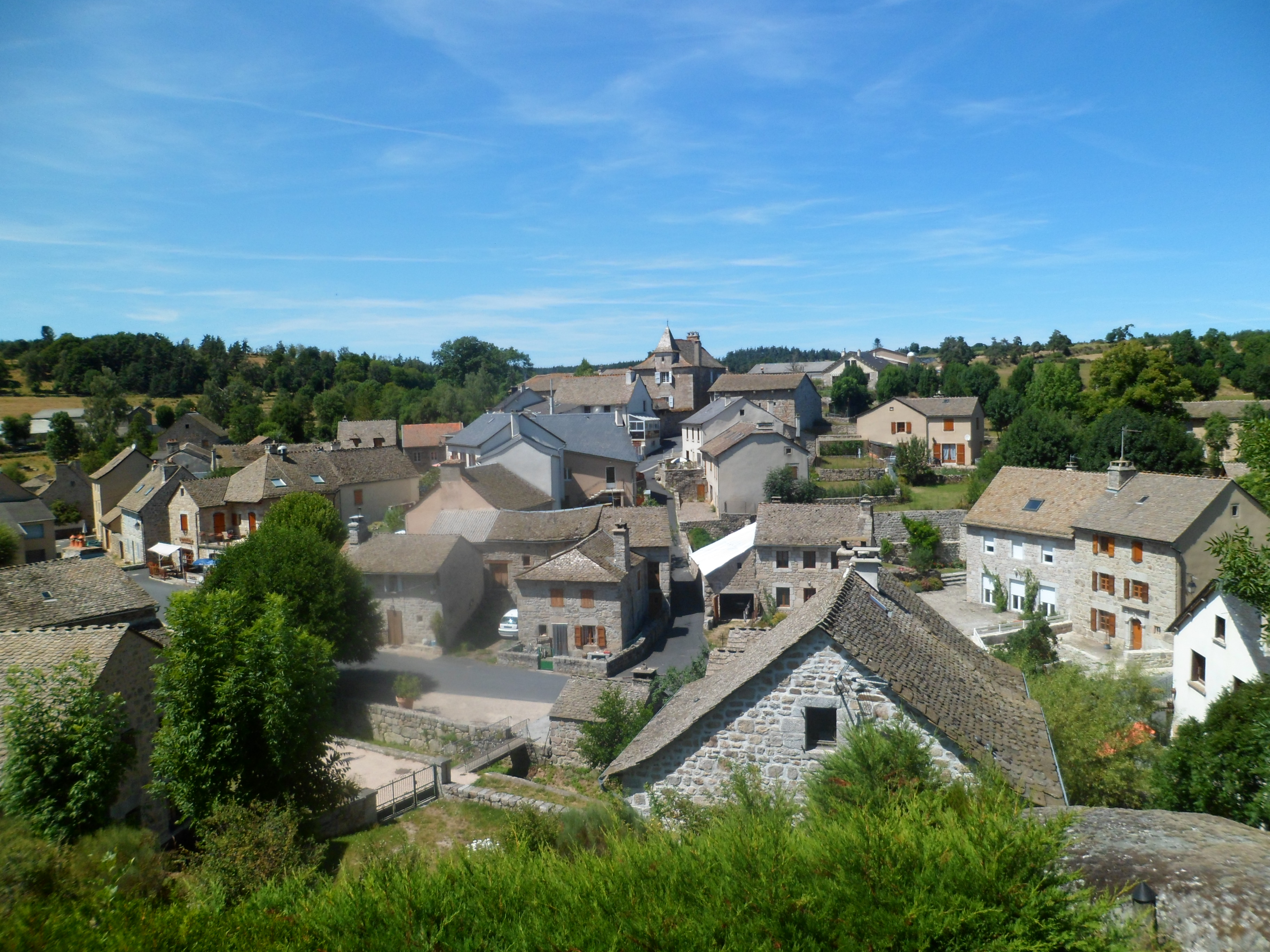 Le village de Recoules-de-Fumas